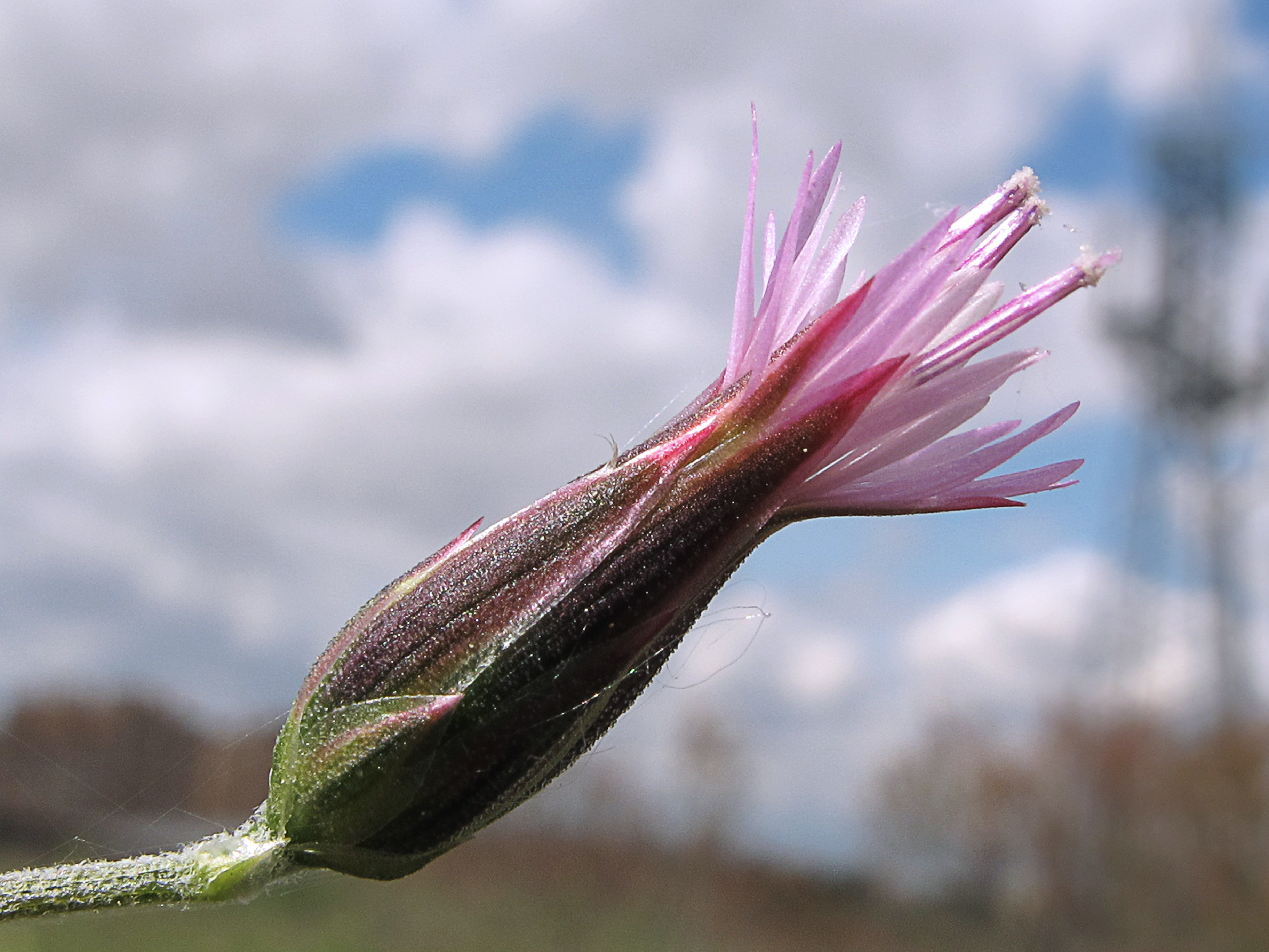 Flores de primavera y verano En Castilla crece en lugares herbosos secos y pedregosos.